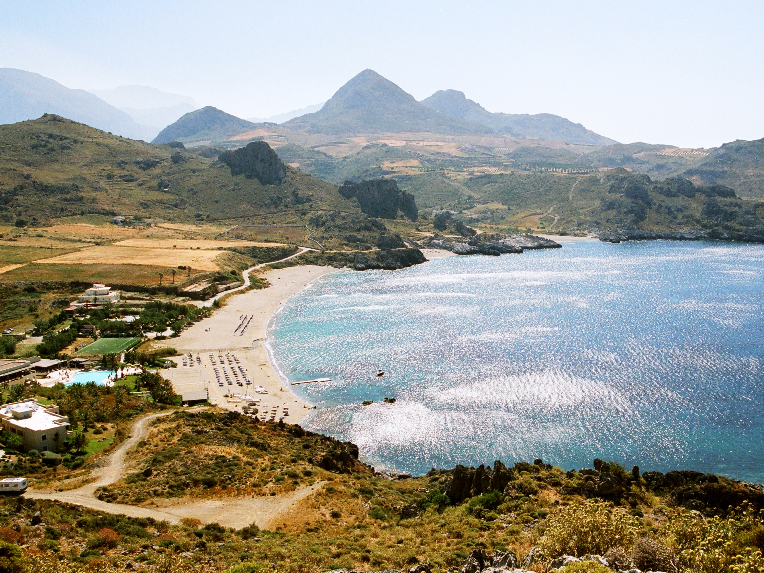 Bucht von Damnoni bei Plakias, mit den Stränden Damnoni, Ammoudaki und Ammoudi, Kreta, Griechenland